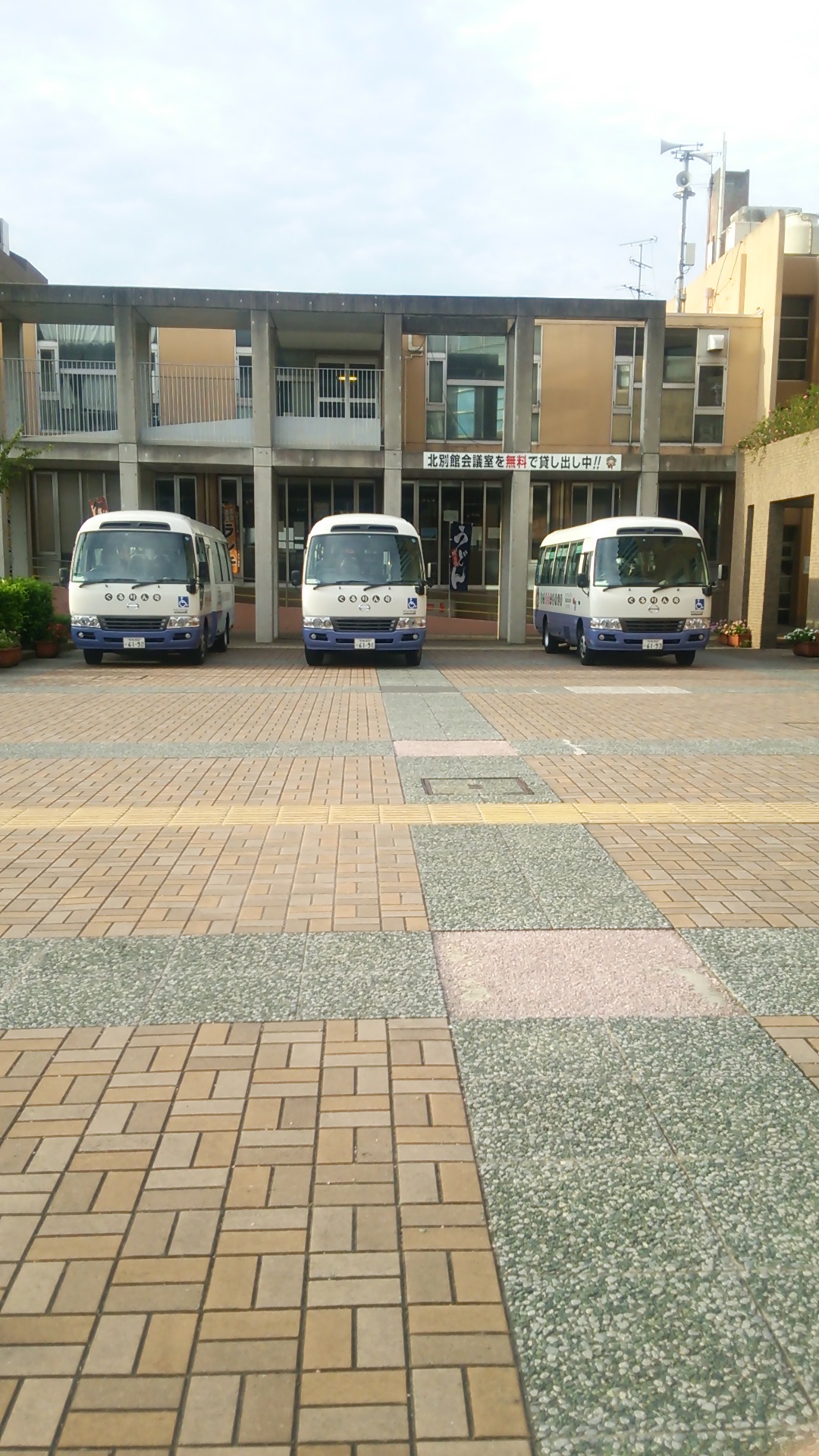 ぐるりん号(二代目バス)松原市役所にて撮影